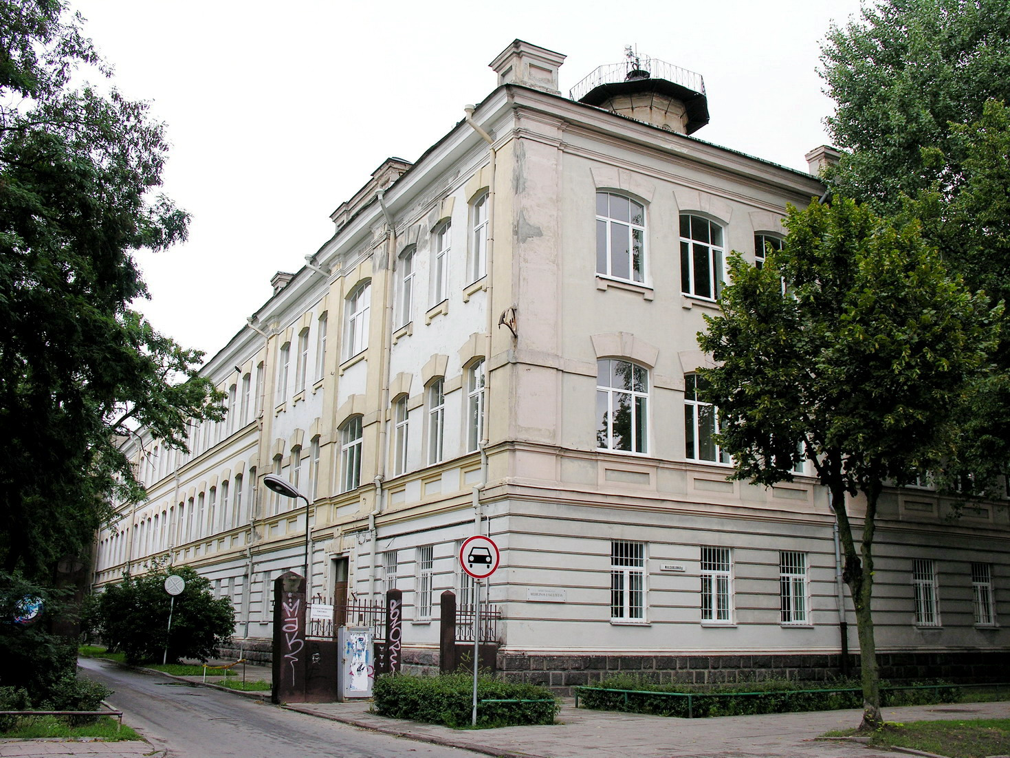 VU medicinos fakultetas Foto: Algirdas, 2006 m. rugpjūčio 8 d., Lietuva